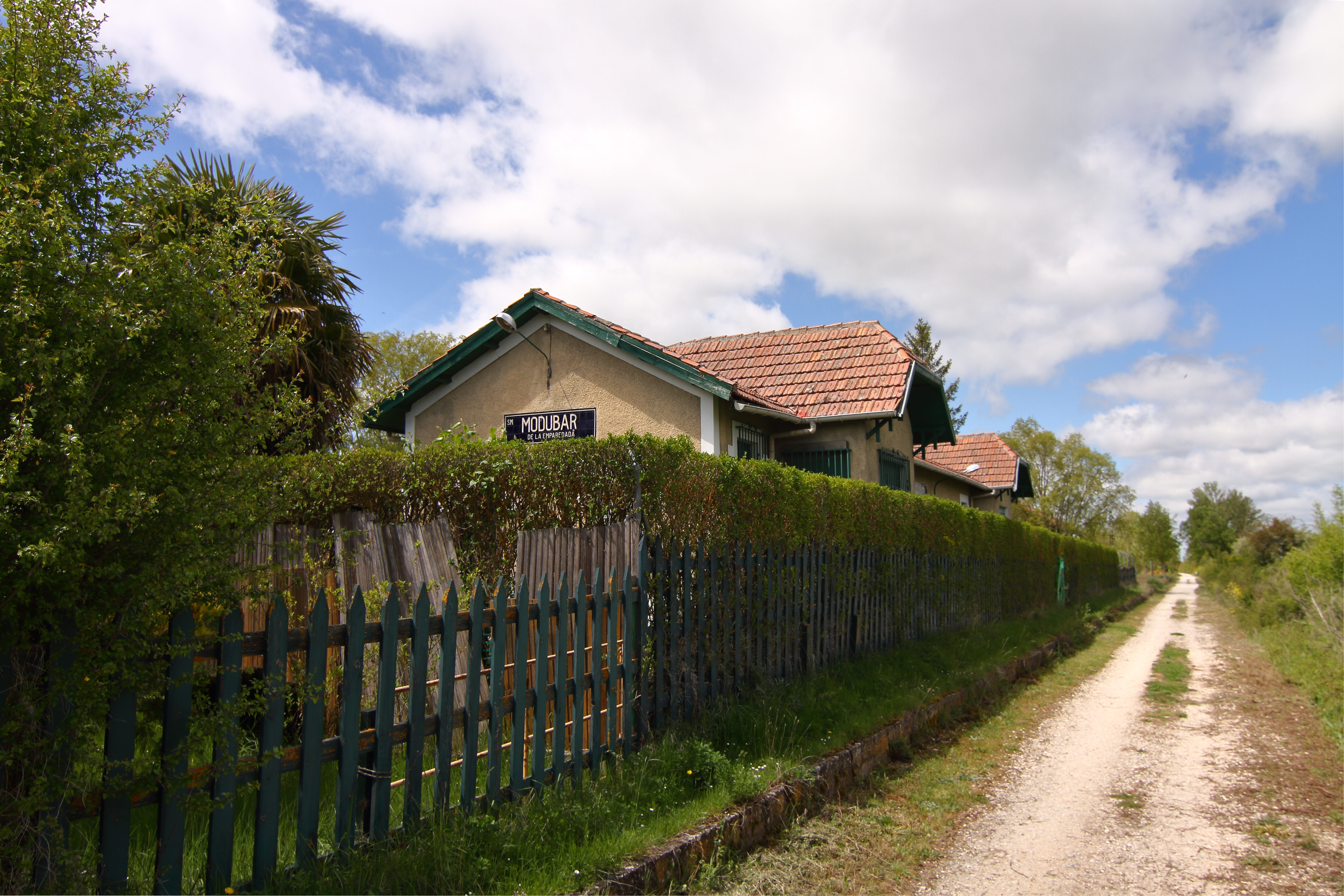 Modúbar de la Emparedada, antigua estación de tren, 01